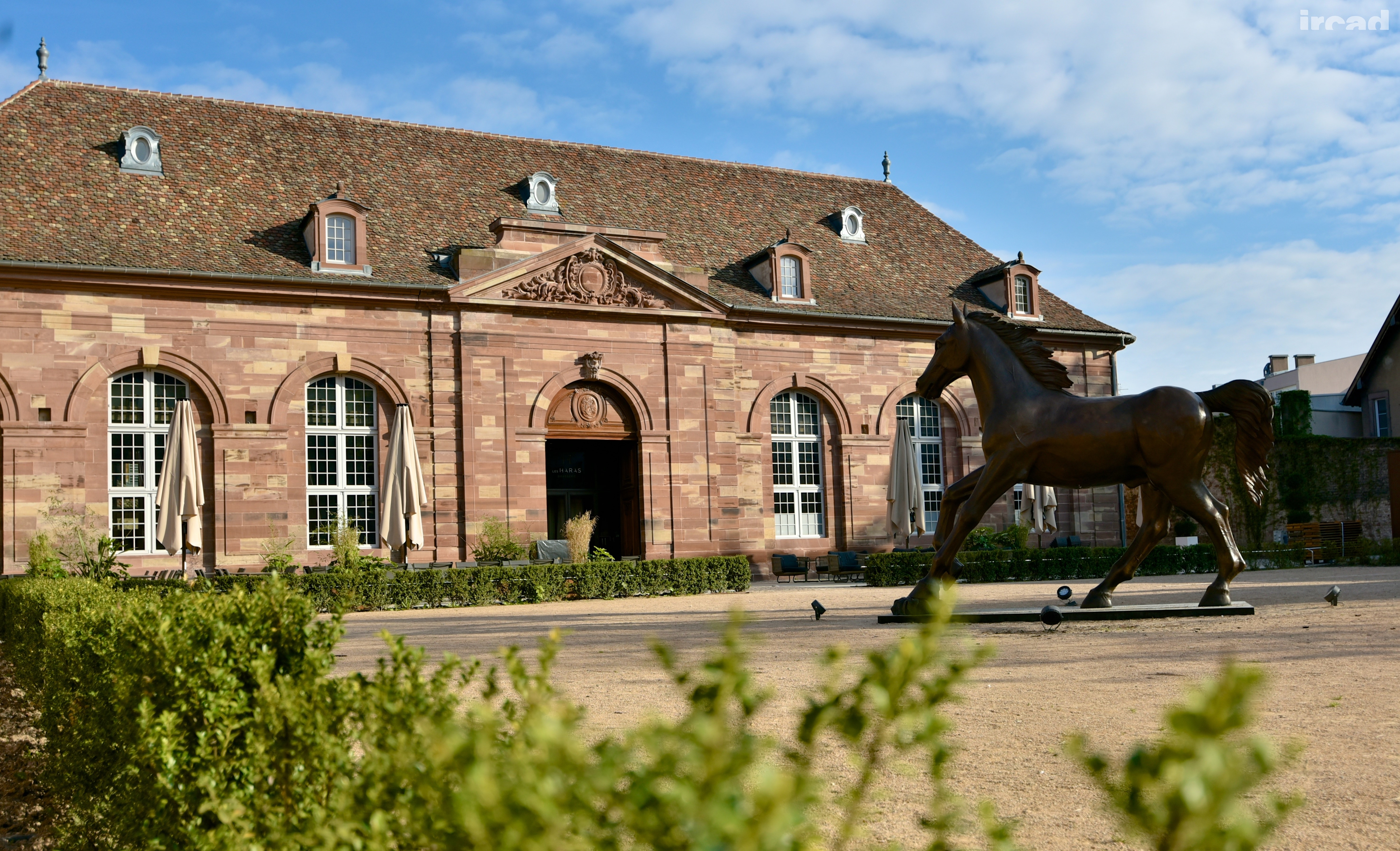 Brasserie des Haras vue de la cour